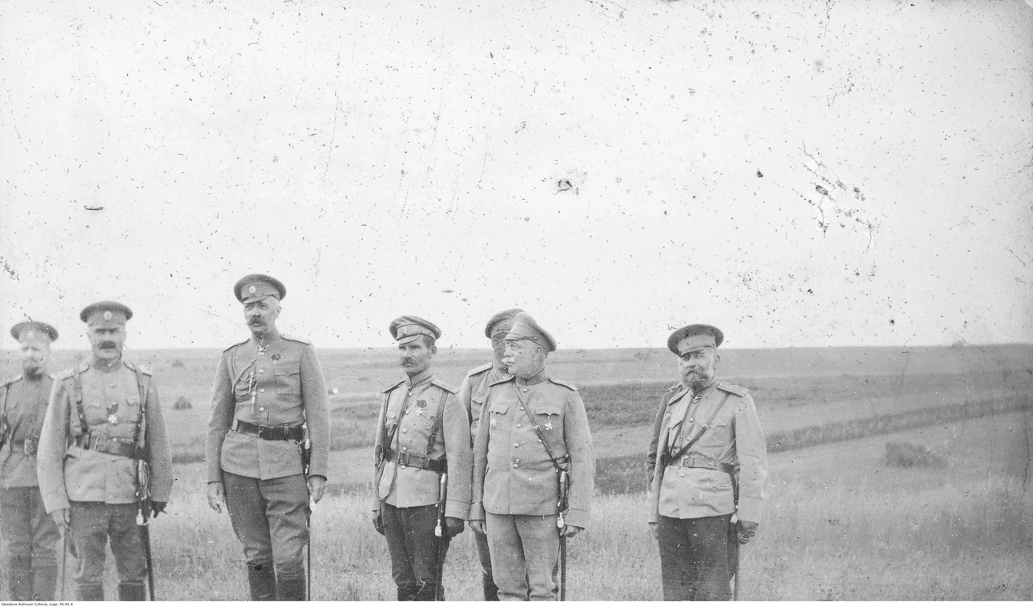 Wielki książę Georgij Michajłowicz wśród wyższych oficerów. Stoją od lewej: NN, gen. Aleksiej Kaledin, wielki książę Georgij Michajłowicz, gen. Michaił Chanżin, gen. Timczenko, płk Rakowicz.